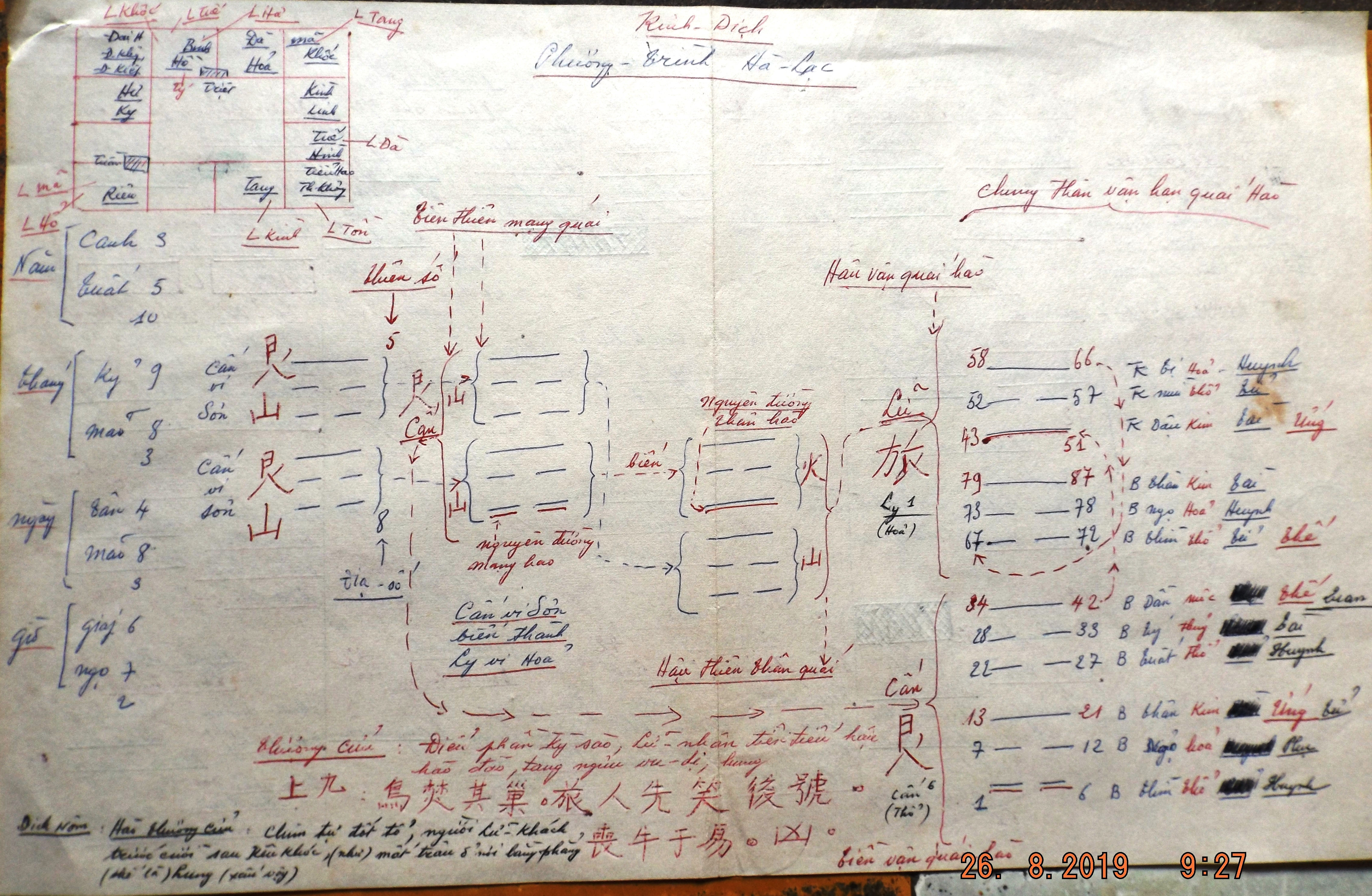 HLHTPhiet